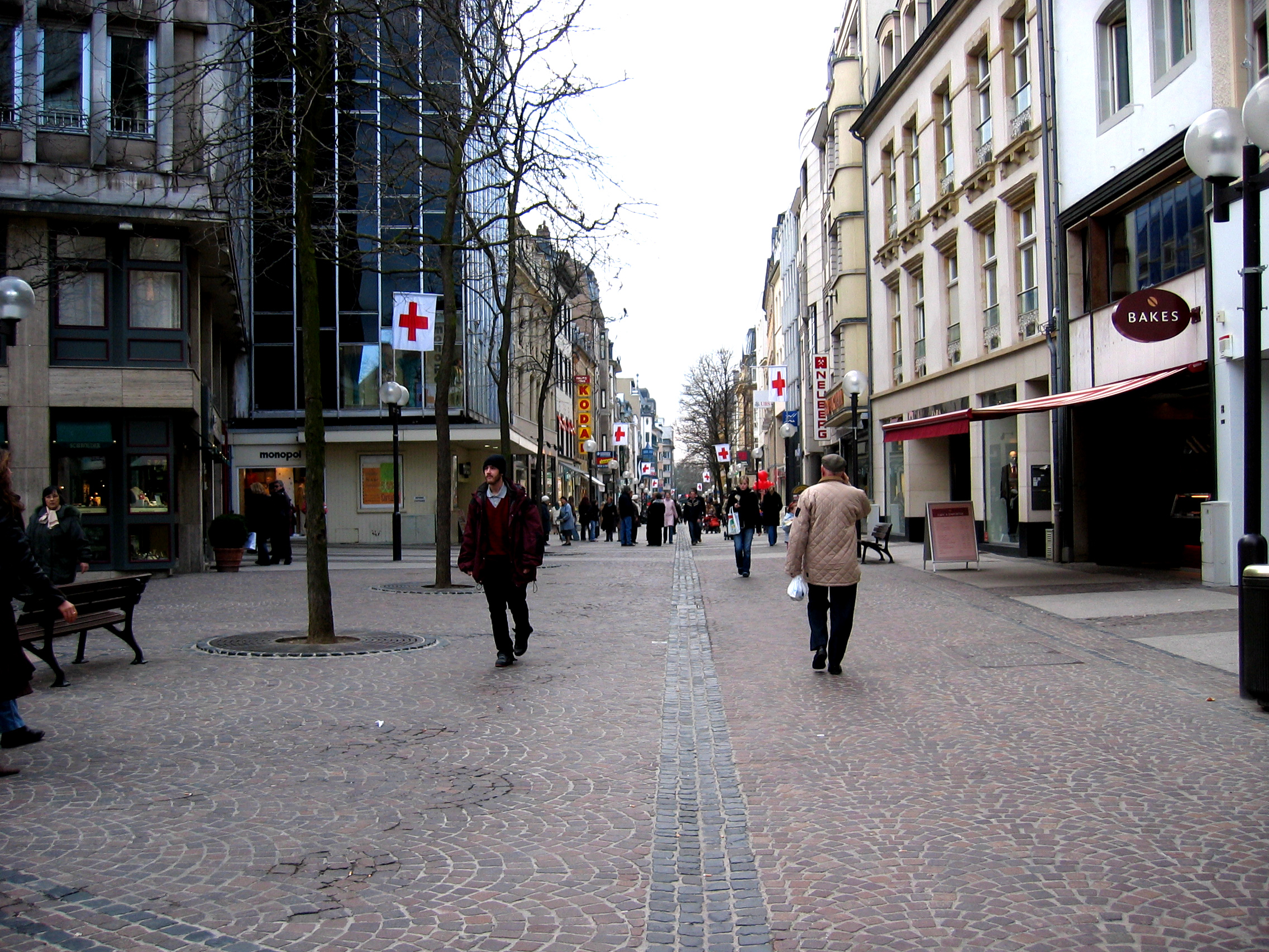 Rue du centre ville de Luxembourg - Quel passant aborder pour les jeunes stagiaires (originaires de plusieurs pays) de l' Académie Européenne d'Otzenhausen qui sont "lachés en ville", par groupes, pour une mini-enquête sur l'Europe ?